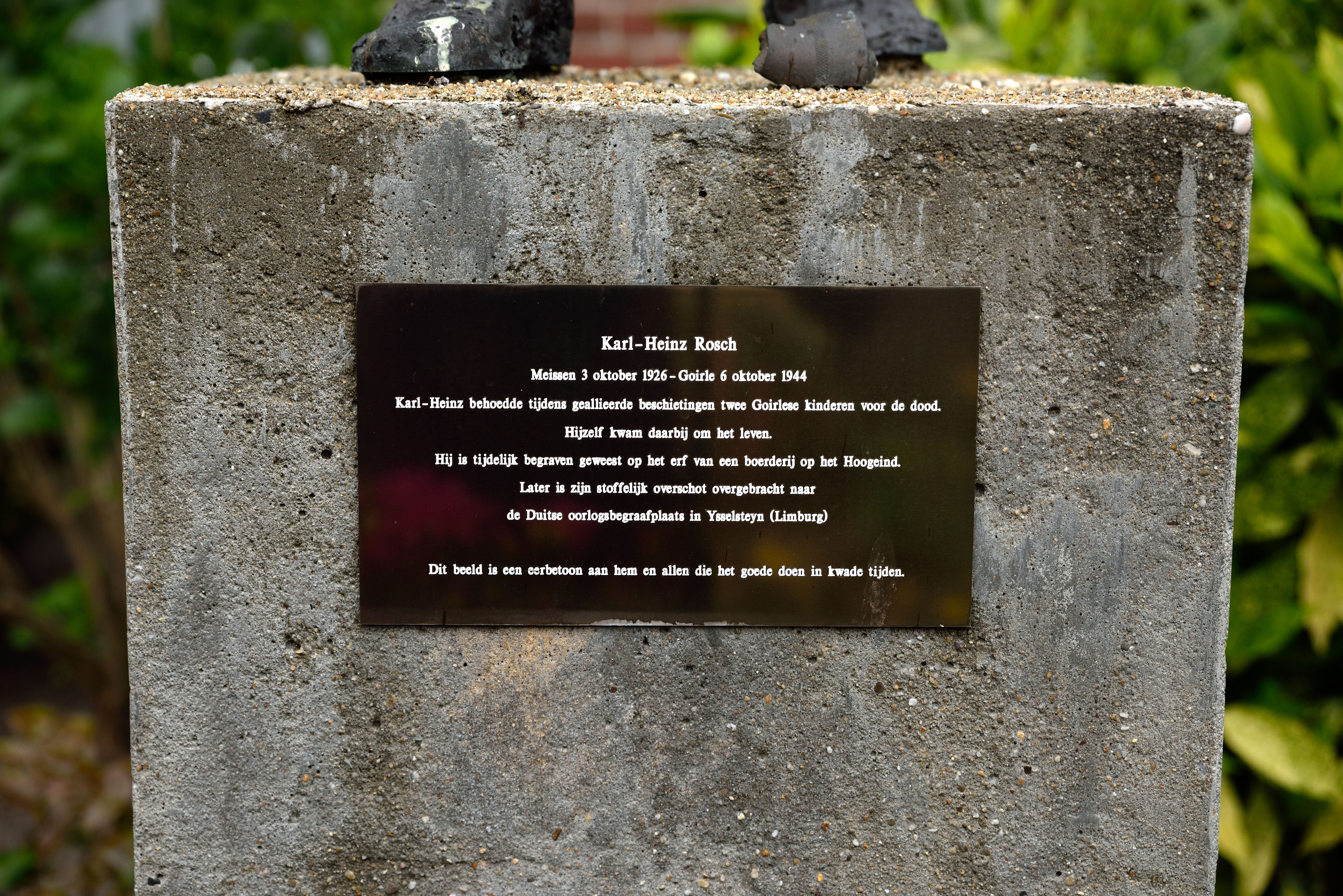 Close-up van de plaquette op het monument voor Karl-Heinz Rosch in Riel (gem. Goirle).